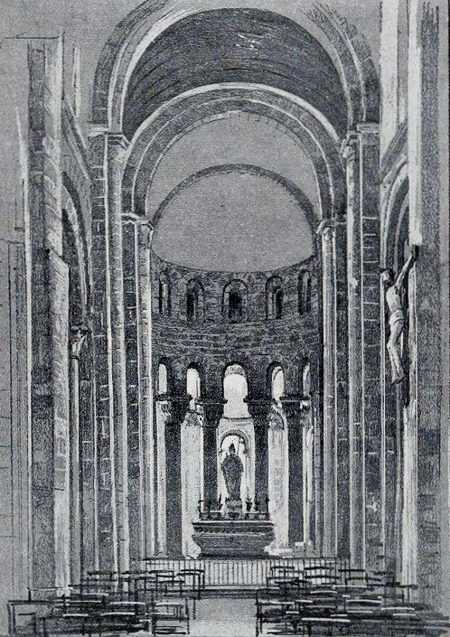 L'église paroissiale de Loctudy avant 1903 (dessin de A. Karl)